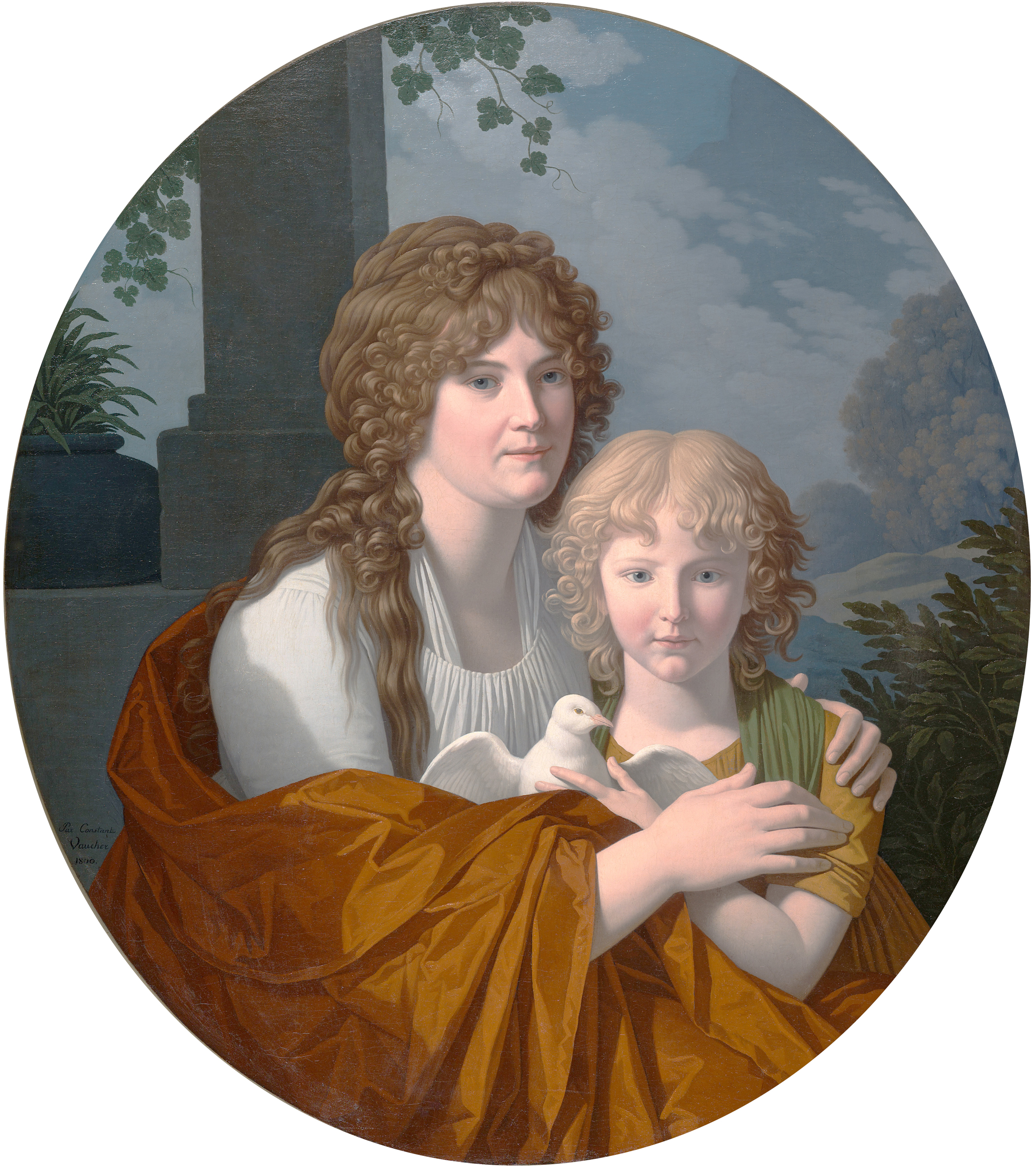 Portrait d’une femme et d’une enfant tenant une colombe